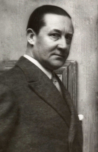 portrett, mann, kunstmaler, stående knefigur, maleri.